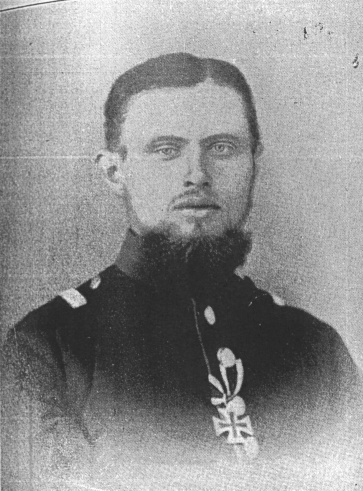 Johannes Gallandi (1843–1917) als Regimentsadjutant